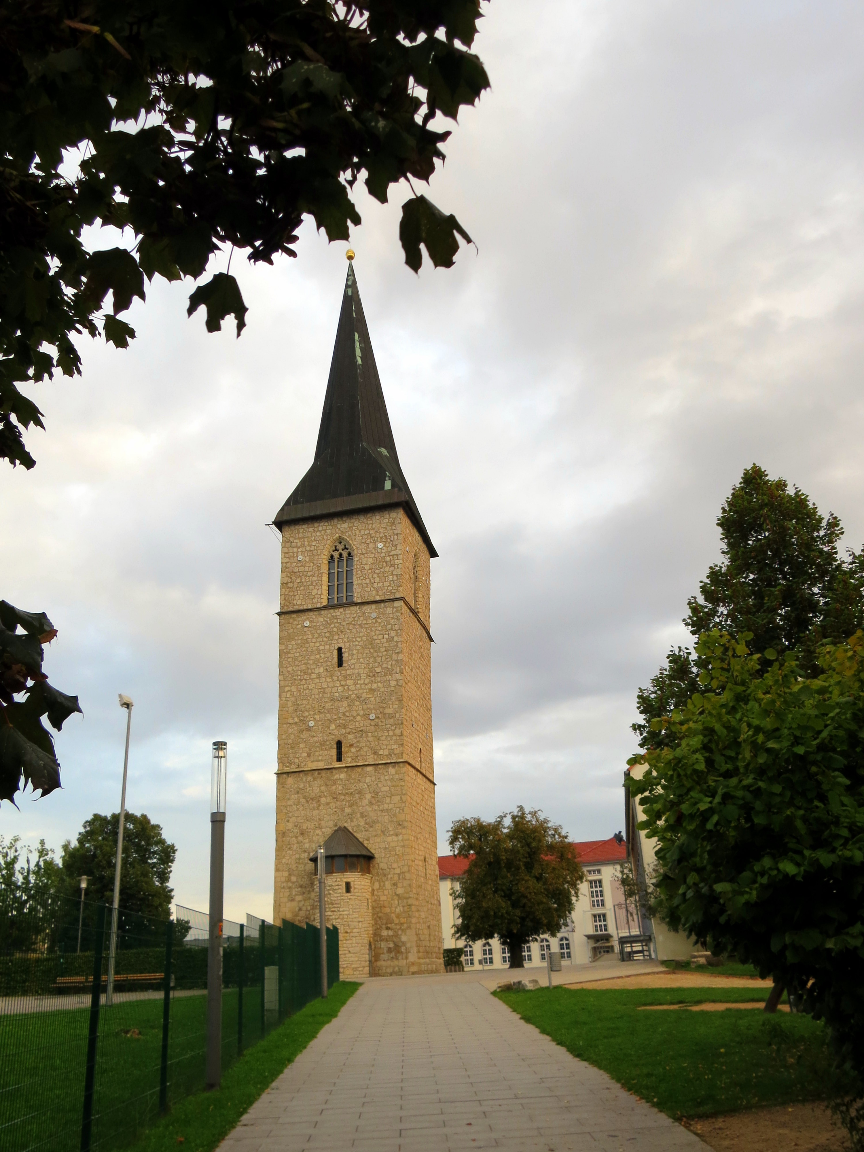 St. Petri in Nordhausen (2014)